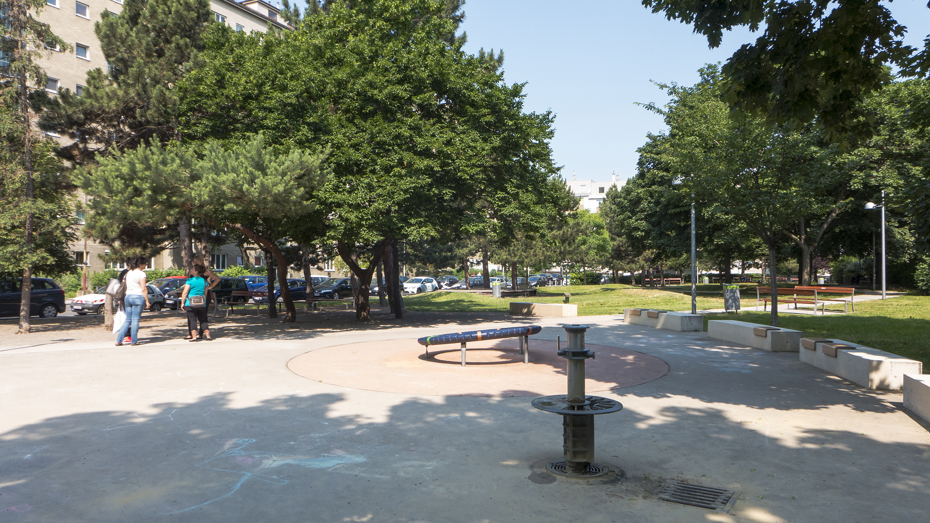 Braunhuberpark in Wien 11